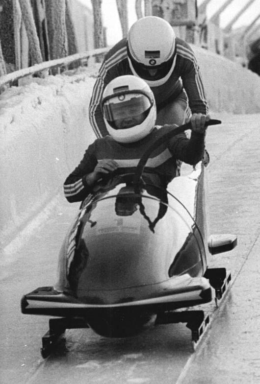 Altenberg, Bobsport, Harald Czudaj, Axel Jang ADN-Mathias Hiekel 20.12.90 Altenberg: Bob-Meisterschaft-Die Lokalmatadoren Harald Czudaj-Axel Jang (Zinnwald) wurden am Donnerstag Deutsche Meister im Zweierbob mit der Siegerzeit von 2:51,47 min. Abgebildete Personen: Czudaj, Harald: Bobsportler, DDR